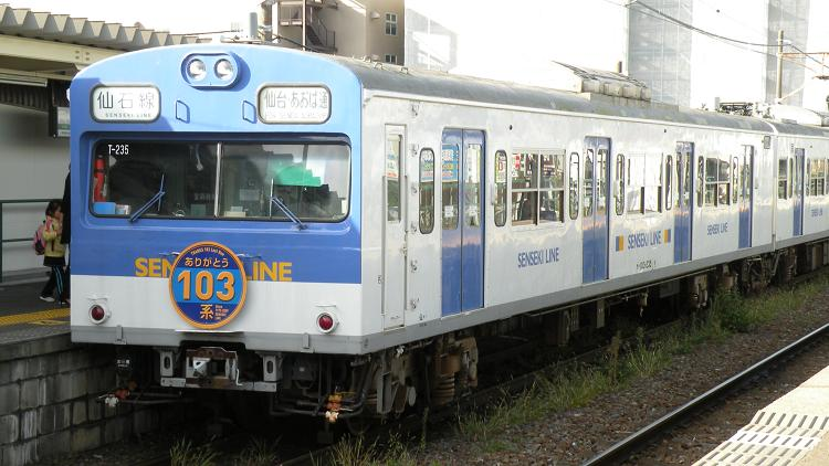 仙石線103系最終日、最後の「あおば通」行電車。